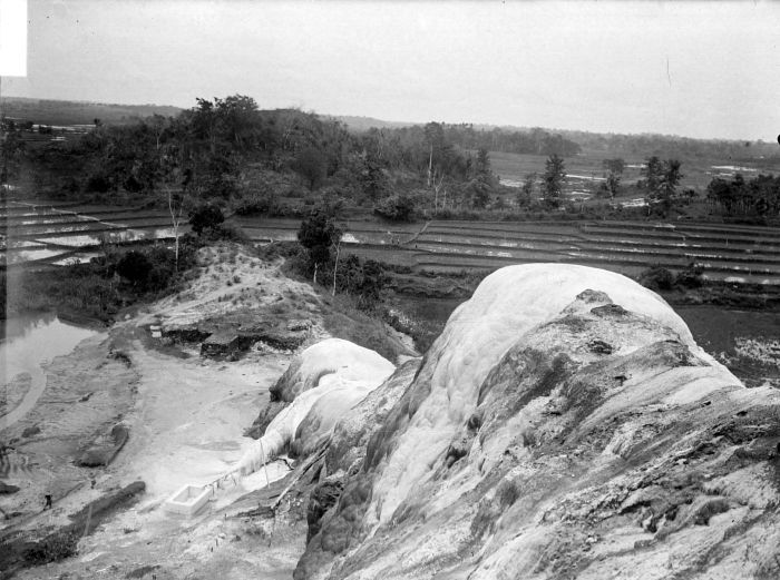 Negatief. De kalkbergen van Koeripan